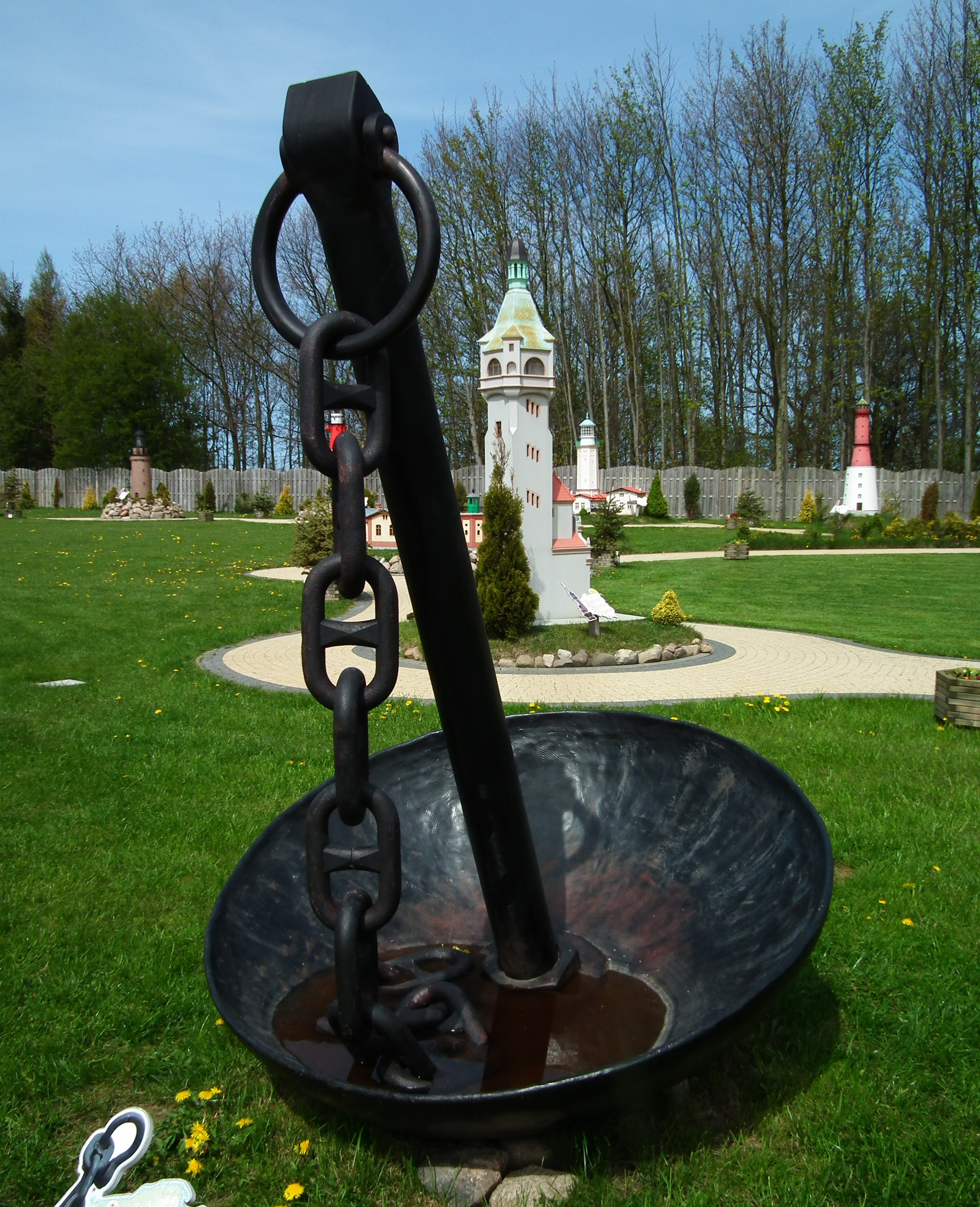 Kotwica grzybkowa w skansenie miniatur w Niechorzu.